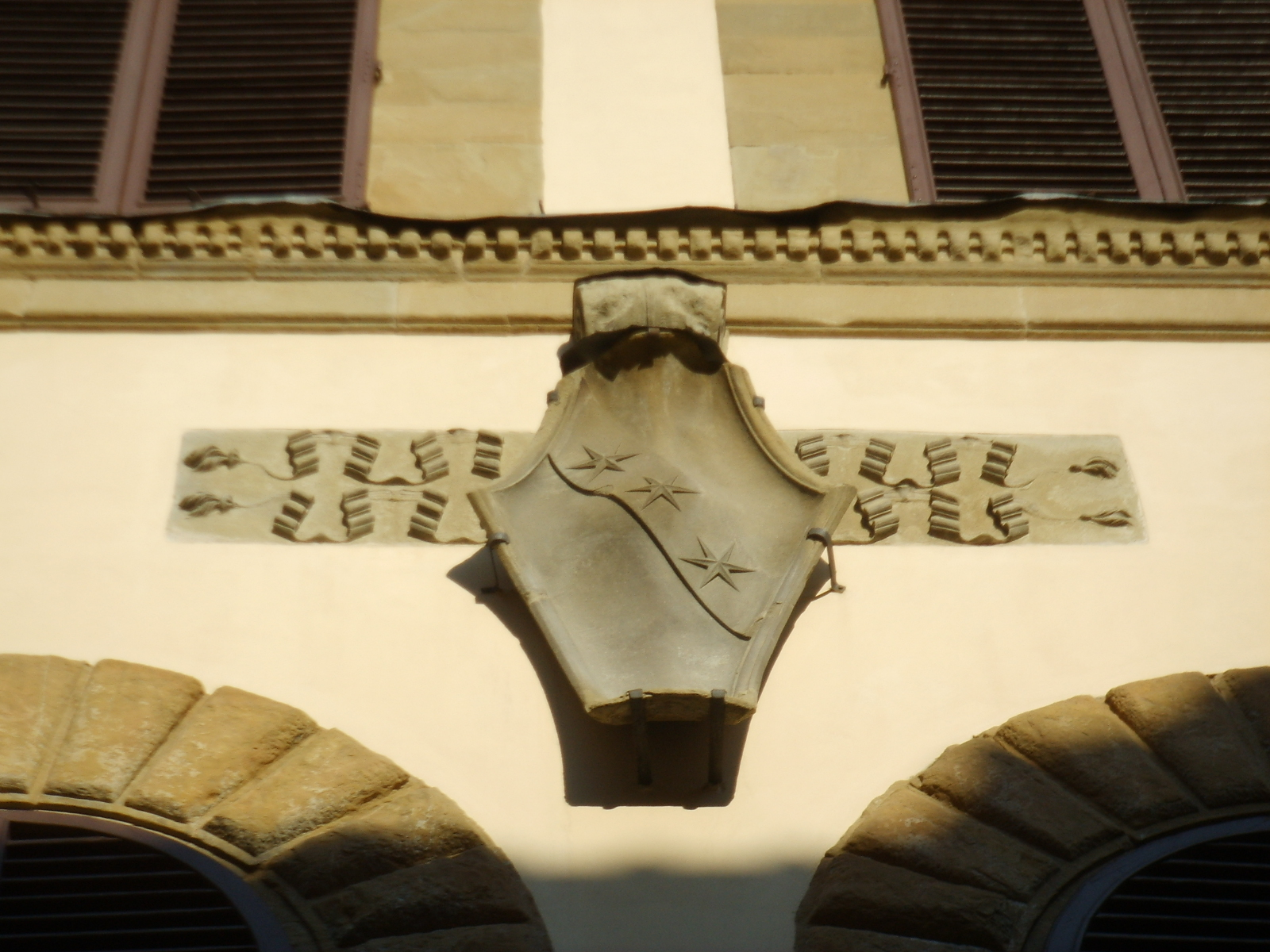 Palazzo ginori stemma 2